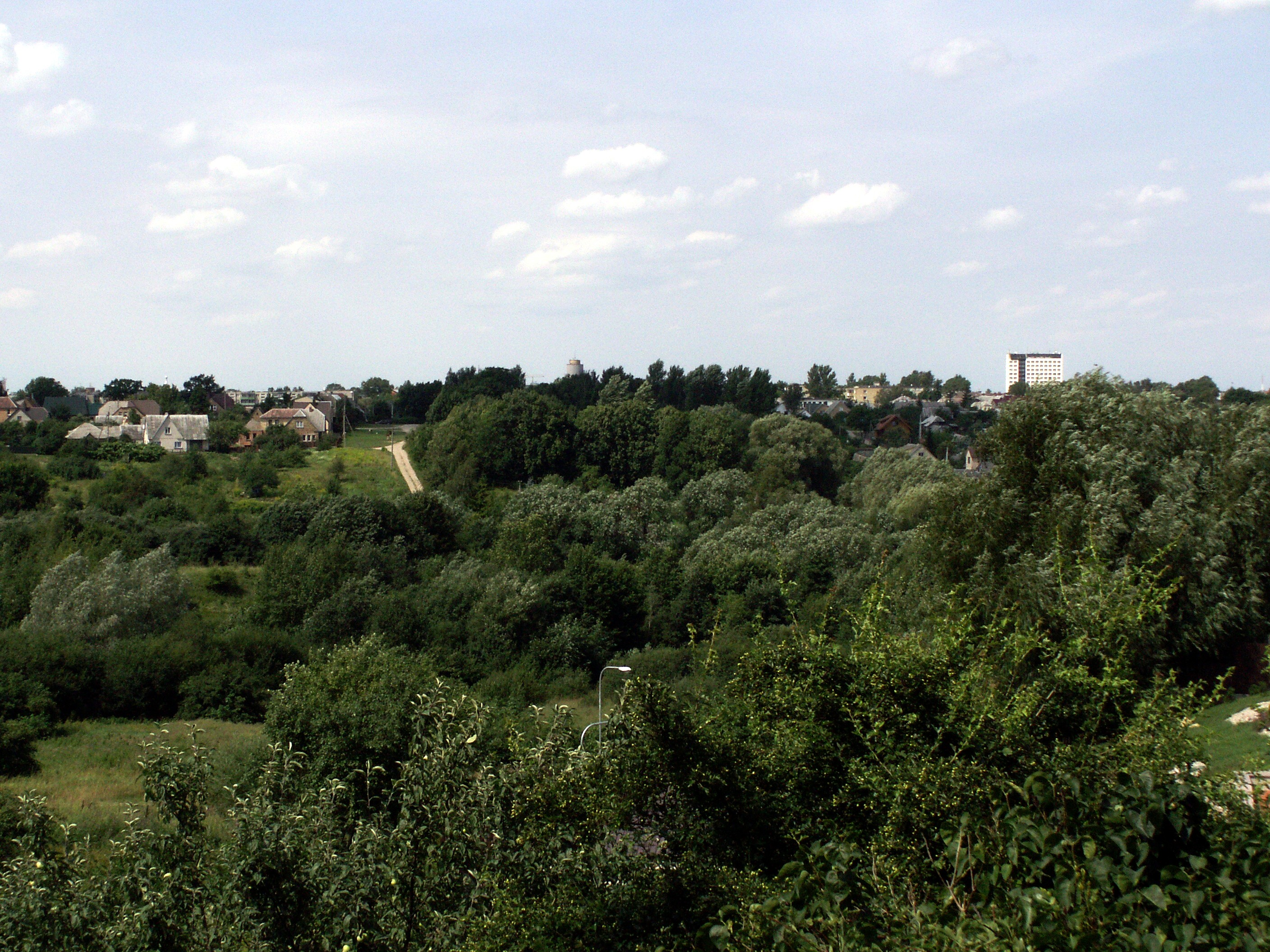 Kaukazas (Šiauliai) nuo Šimšės